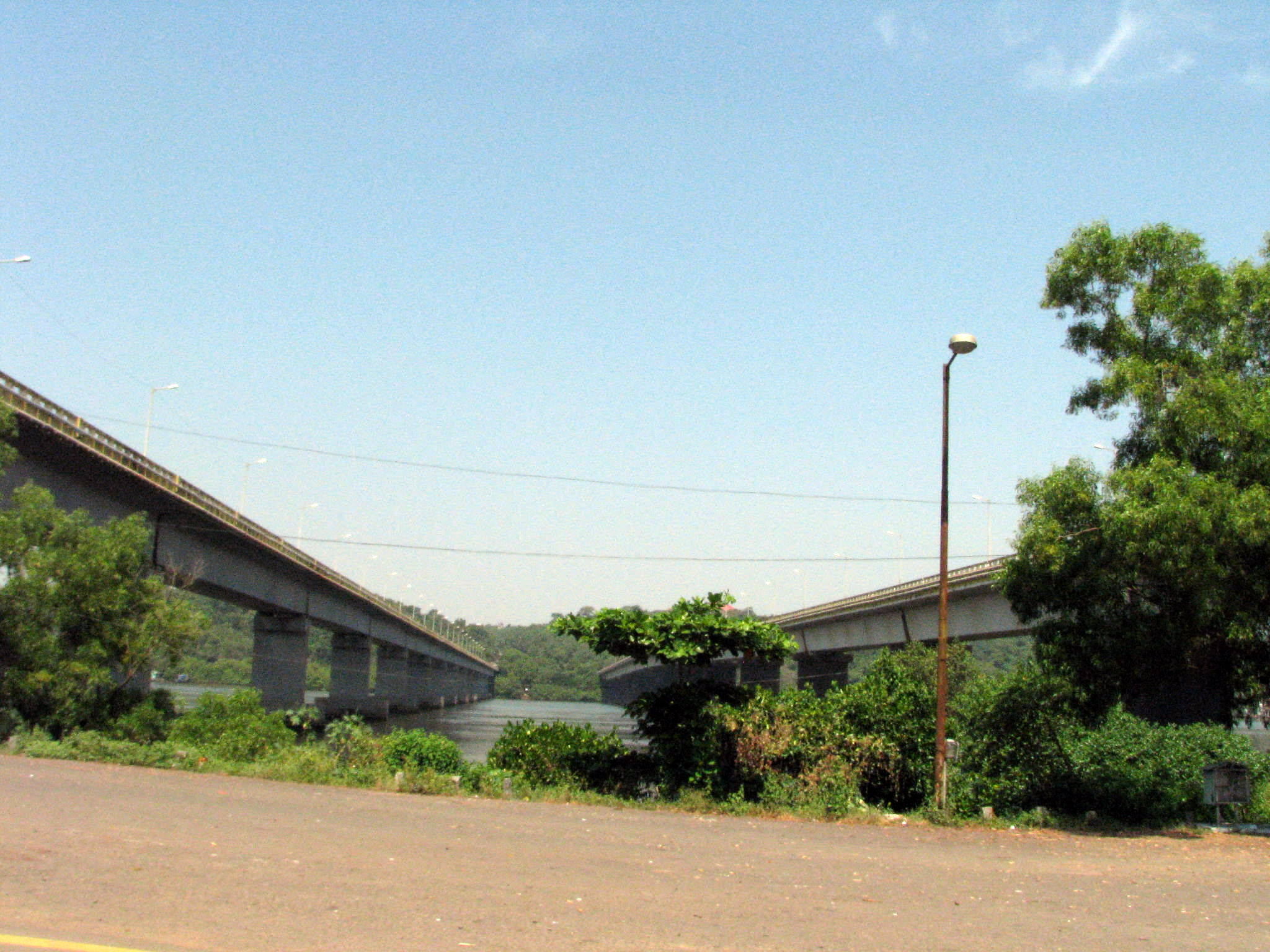 Mandovi Bridge